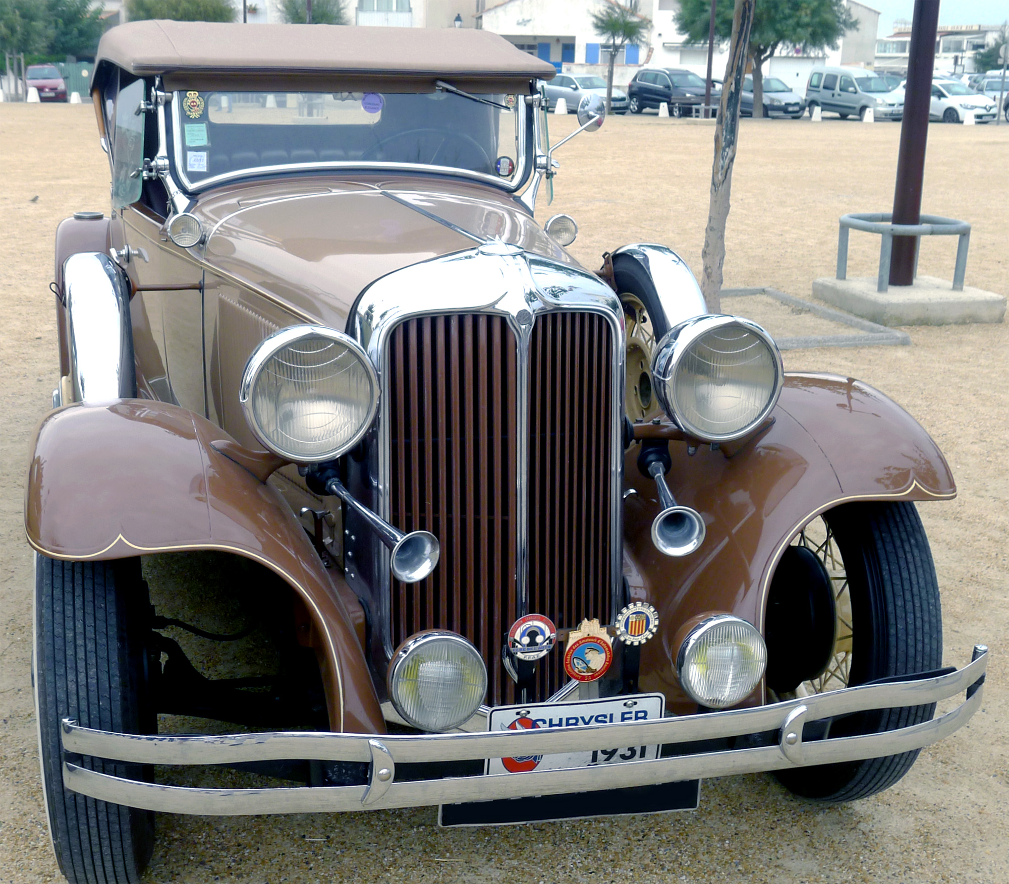 Chrysler (modèle xxxx)